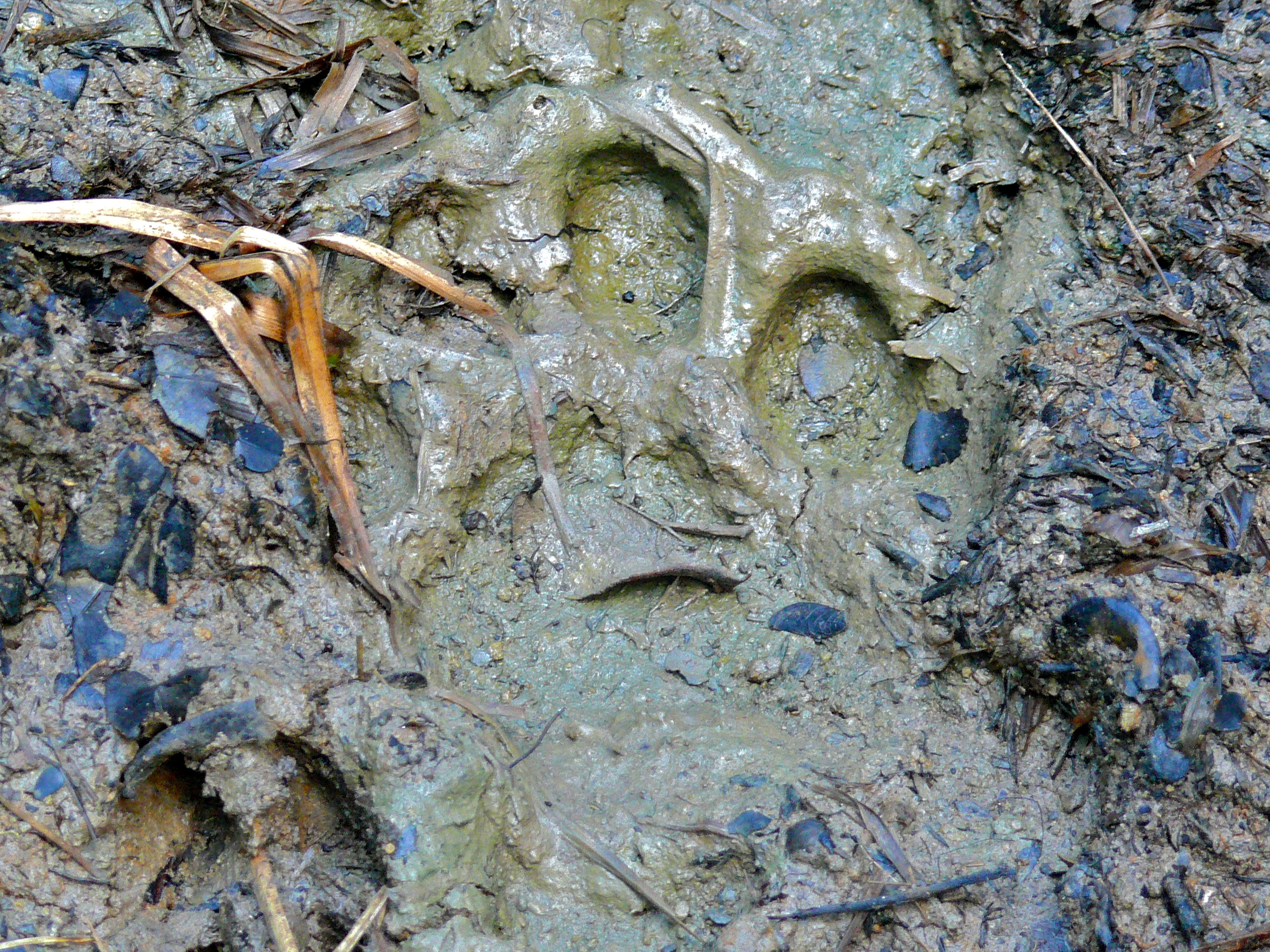 Tikal NP Guatemala